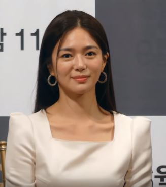 13일 오후 서울시 강남구 논현동 임피리얼 팰리스 서울에서 JTBC 새 금토드라마 '보좌관-세상을 움직이는 사람들' 제작발표회가 열려 신민아X이엘리야가 기자의 질문에 답변을 하고 있다.